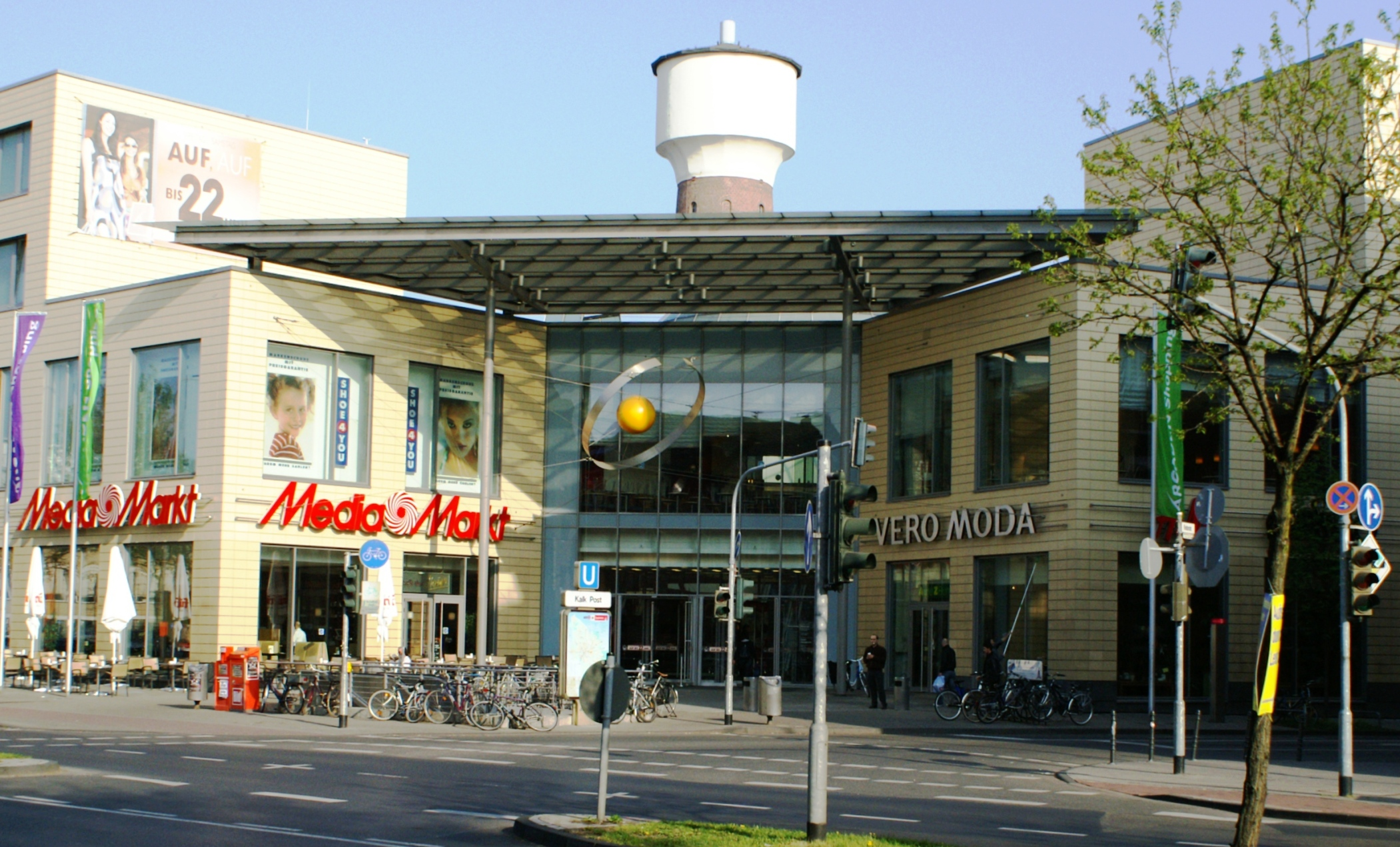 Haupteingang der KölnArcaden in Köln-Kalk. Mittig in den Komplex integriert der denkmalgeschützte Wasserturm der stillgelegten Chemischen Fabrik Kalk.